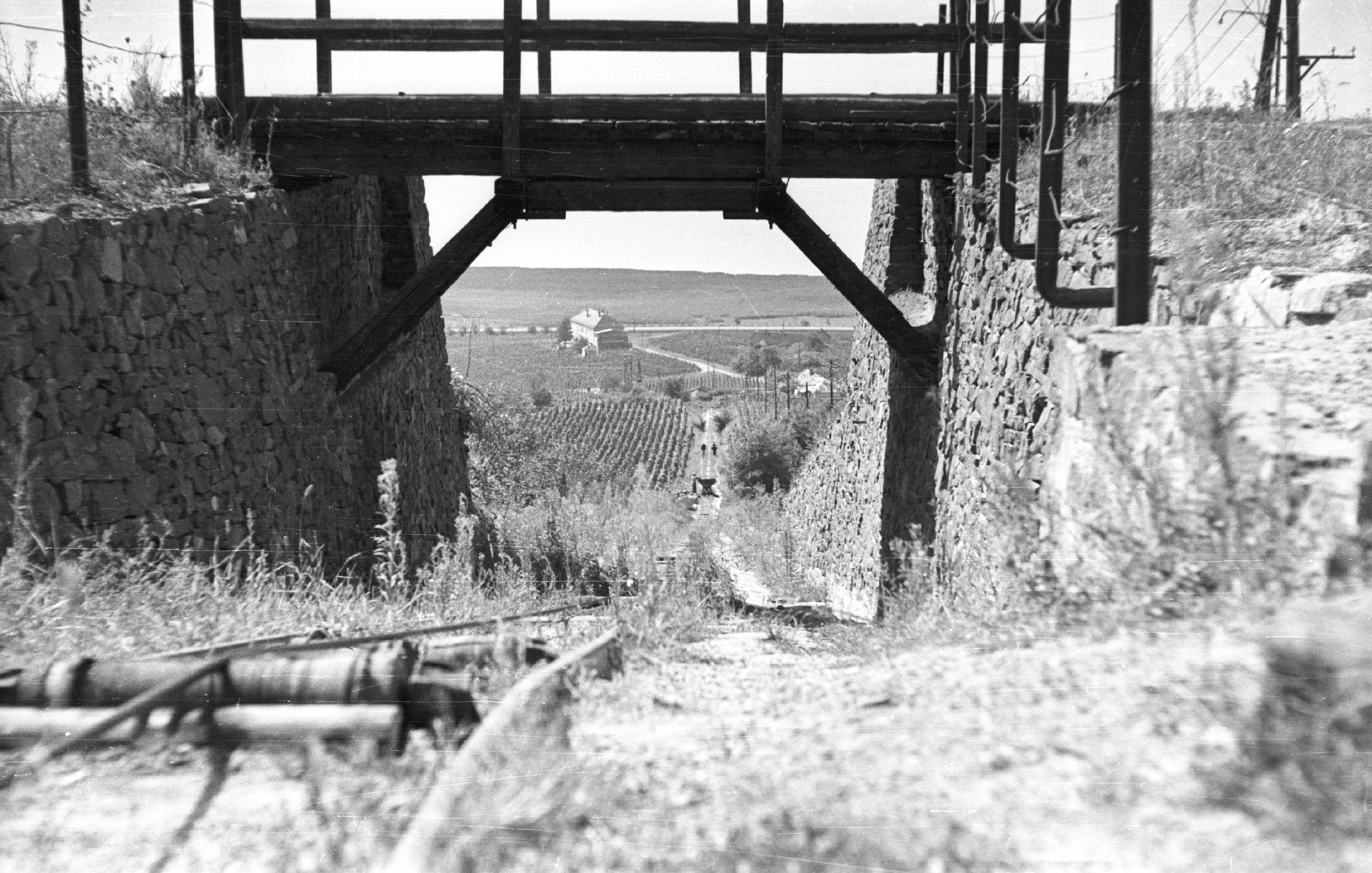 kőszállító csille sínpályája. Location: Hungary, Badacsony, Lake Balaton Tags: bridge, mining, railway, tram Title: kőszállító csille sínpályája.